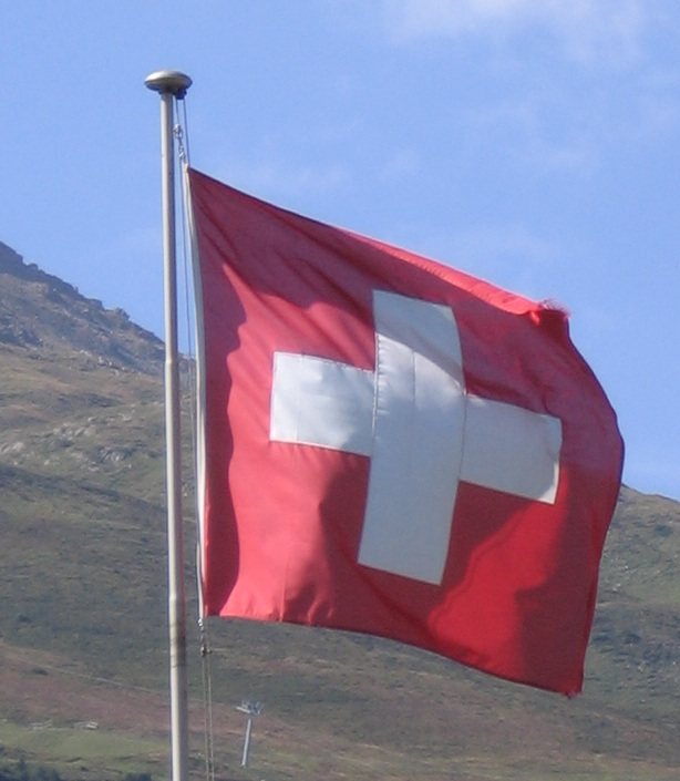 Flag of Switzerland